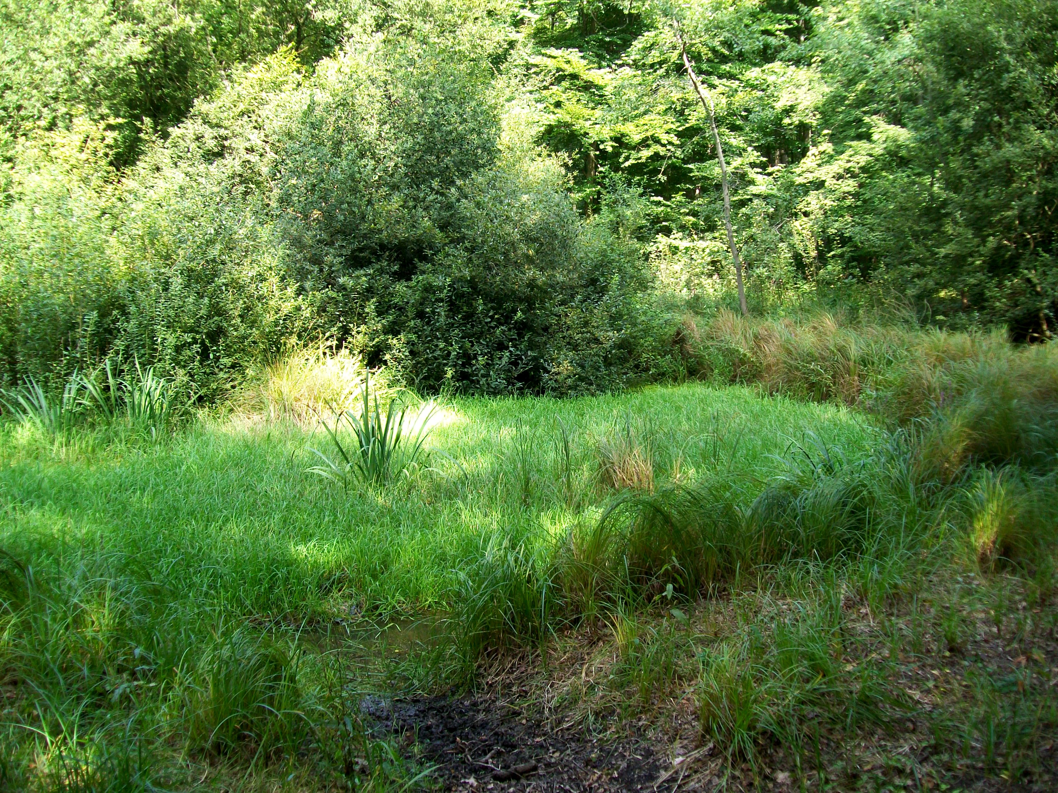 La mare du mont Alta, sur le plateau du mont Alta, parcelles 267 et 268 de la forêt d'Halatte, à la limite des communes d'Aumont-en-Halatte et Senlis.